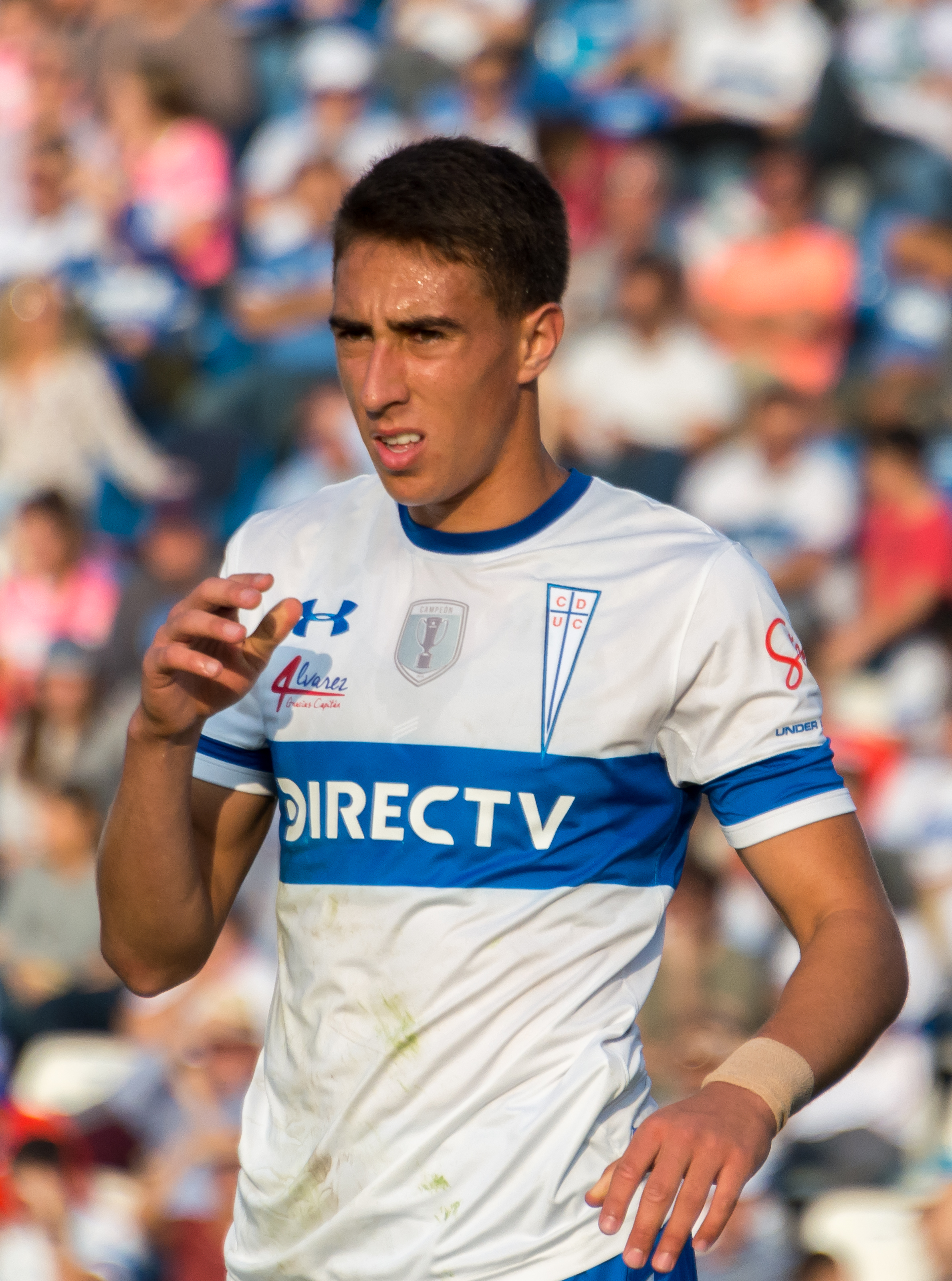 Diego Valencia, Universidad Católica v Curicó Unido, Estadio San Carlos de Apoquindo, Las Condes, Santiago, Región Metropolitana, Chile.